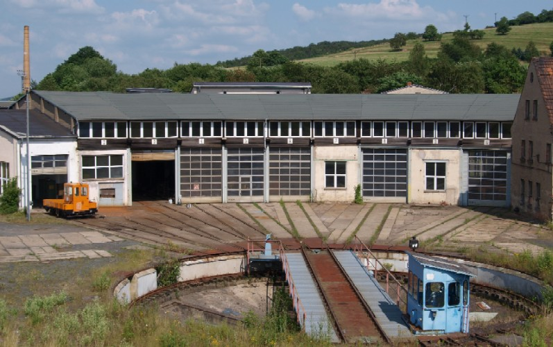 ehemaliges Bahnbetriebswerk in Vacha/Rhön